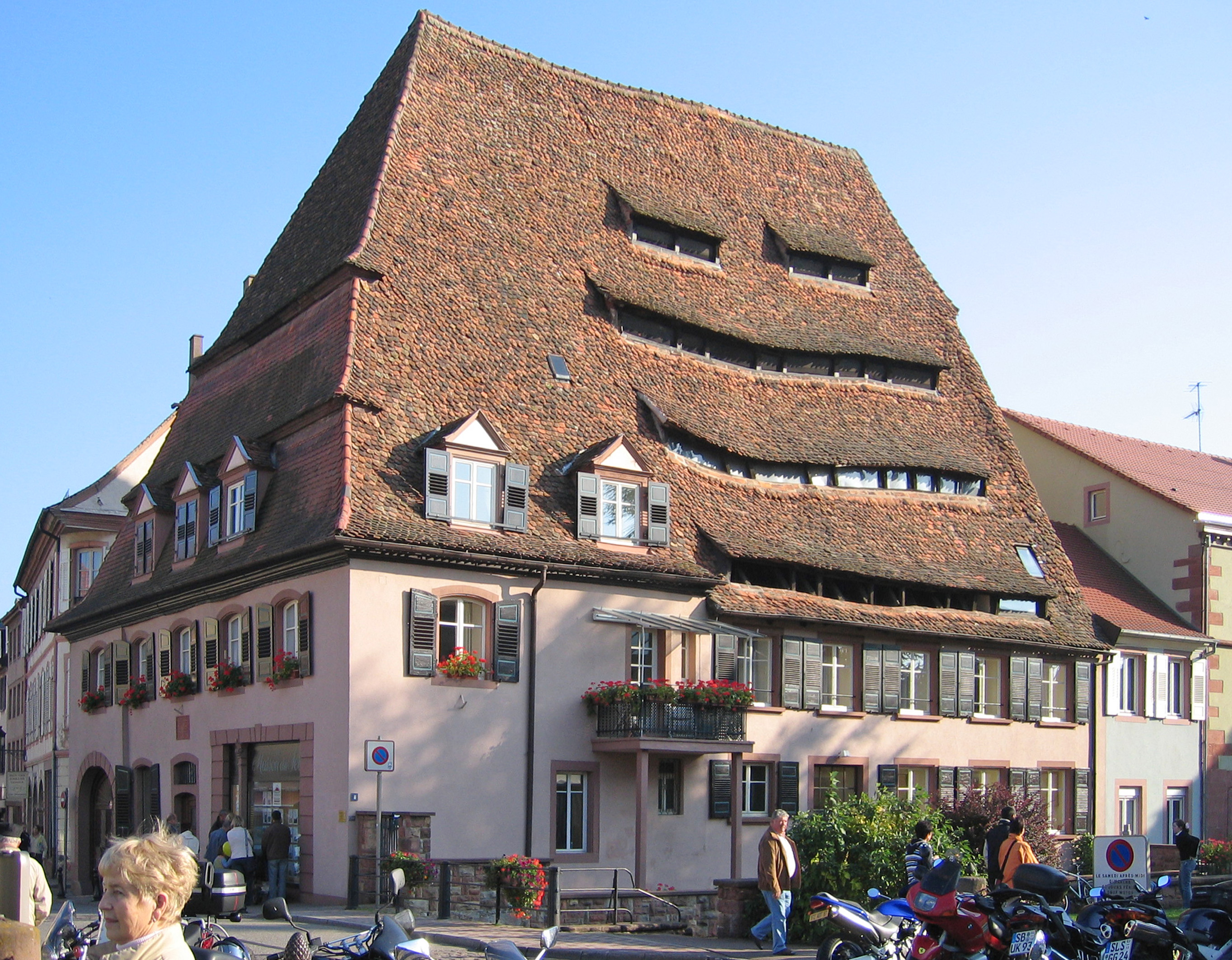 Wissembourg,_Maison_du_sel,_Frankreich.